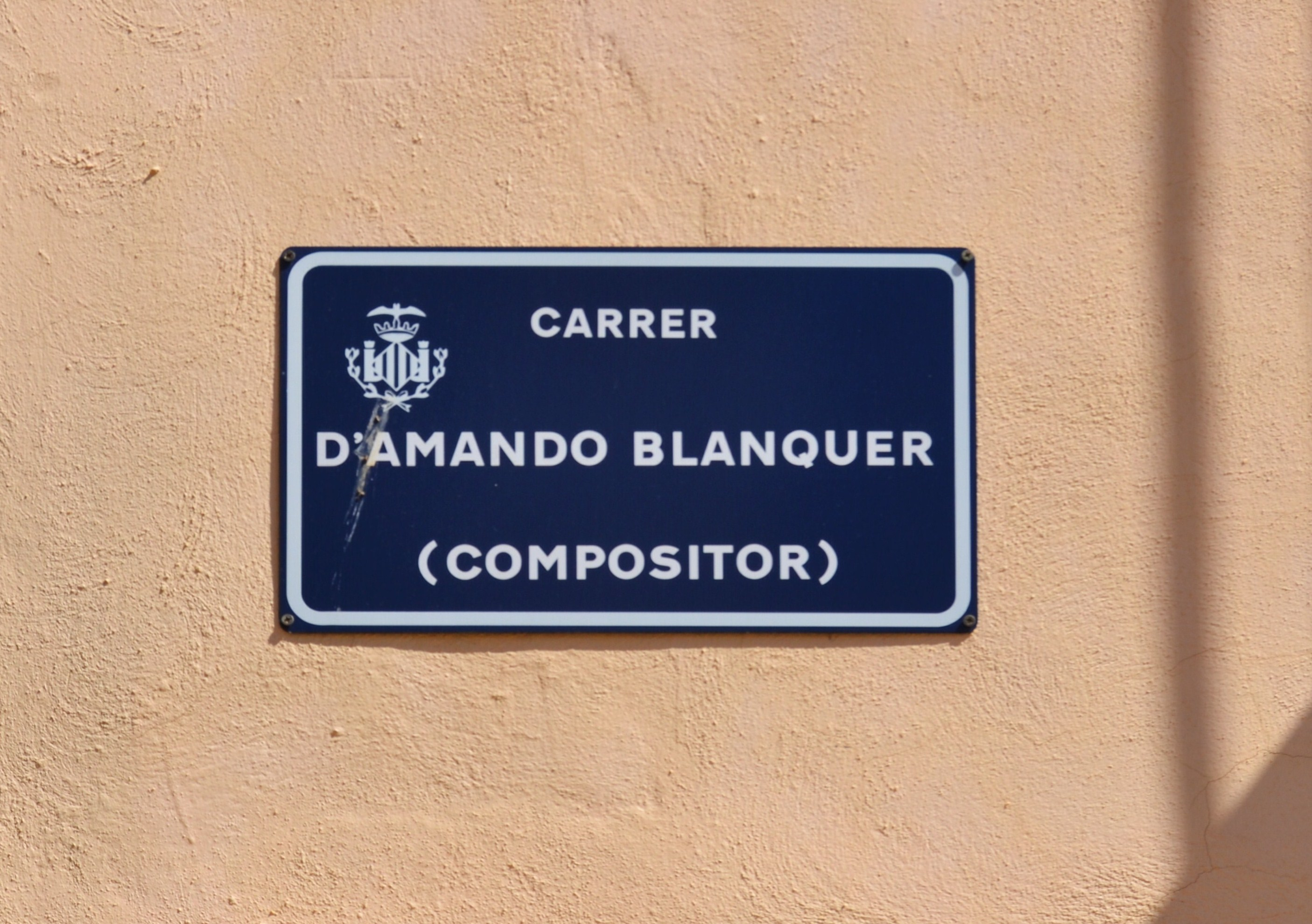 Carrer d'Amando Blanquer, placa.